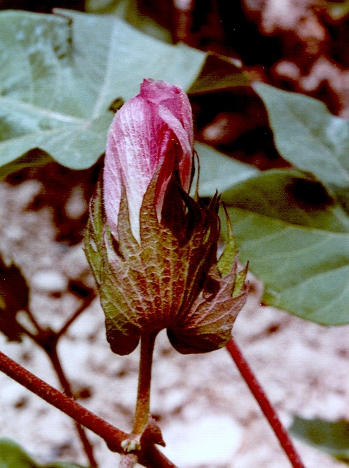 Gossypium herbaceum (algodón): Flor - Cultivado, El Salitre, Albatera (Alicante, España).